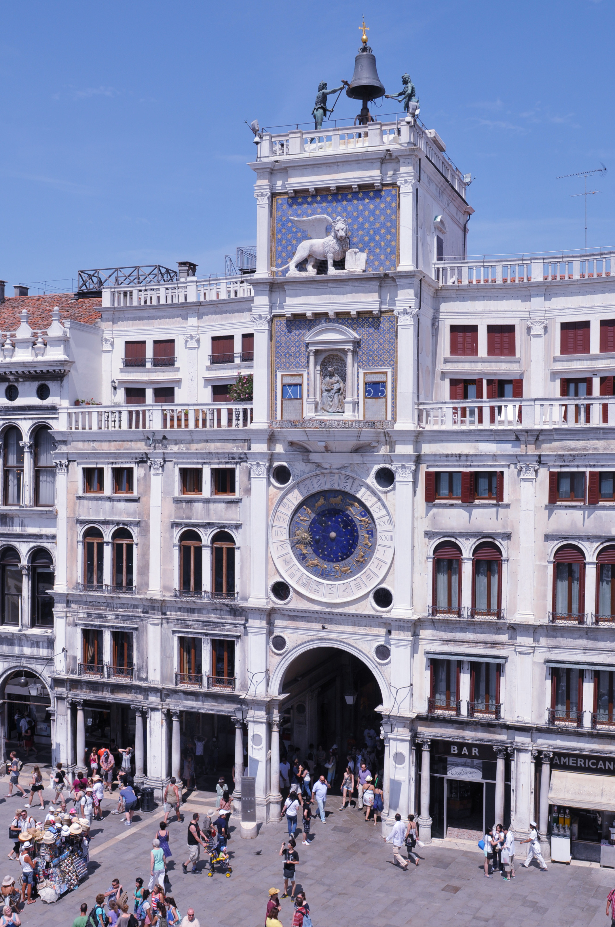 意大利威尼斯 Venice, Italy Cina Xinjiang, Urumqi il benvenuto alla visita della città China Xinjiang Urumqi, sind Sie herzlich eingeladen, Tourismus China Xinjiang Urumqi Welcome you to tour the, Китай Синьцзяна Урумчи приветствовать Вас на экскурсию, الصين ترحب زيارتك لاورومتشى فى شينجيانغ, 中国新疆のウルムチへの訪問を歓迎する, 中国新疆乌鲁木齐欢迎您来观光旅游